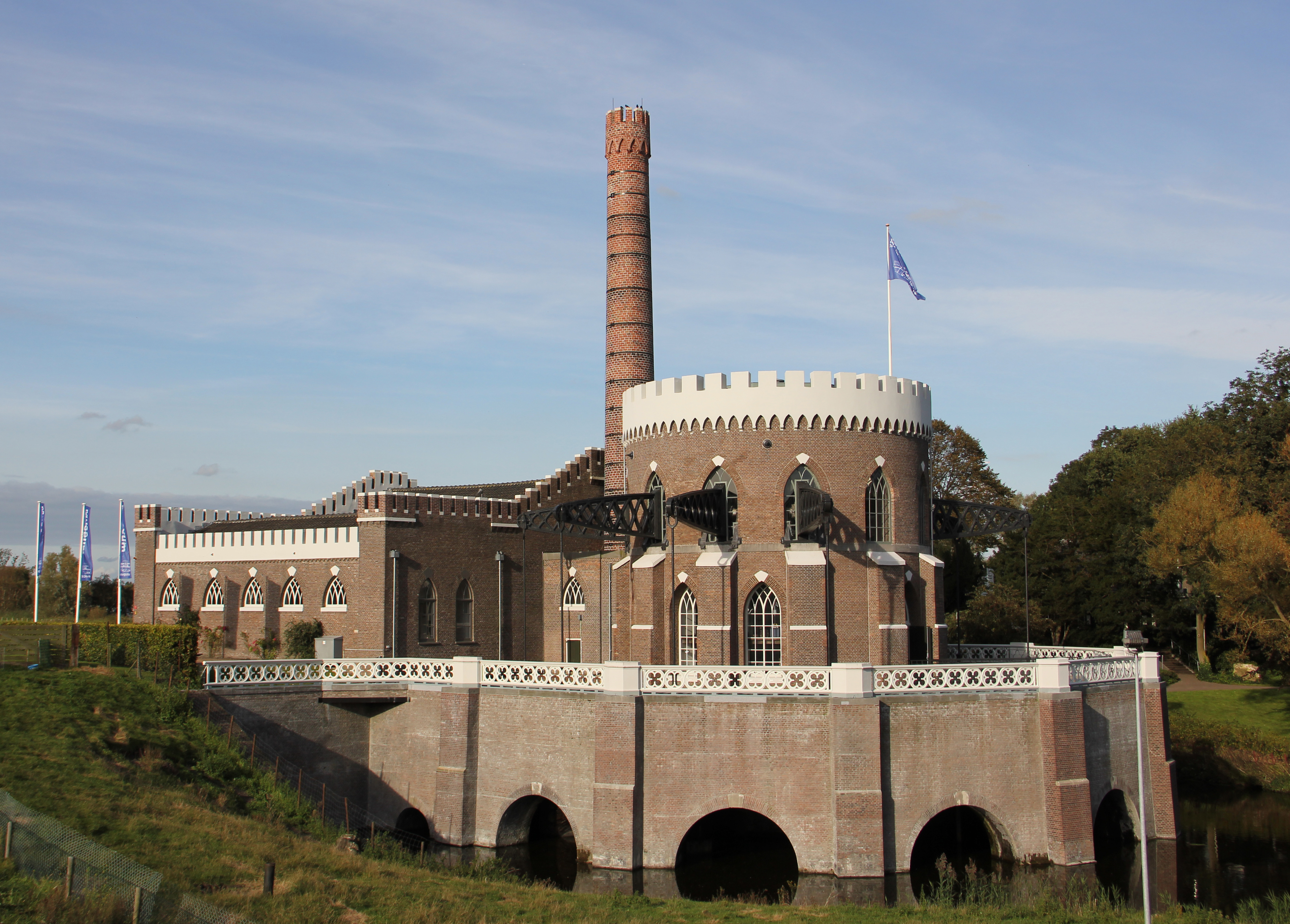 Stoomgemaal de Cruquius na de restauratie van 2010-2011 op de heropeningsdag 15 september 2011